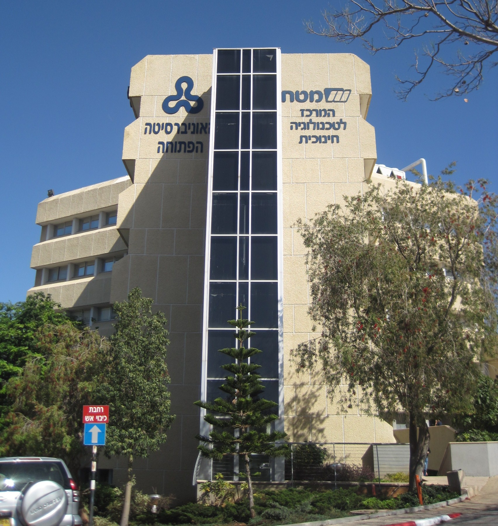 בניין המרכז לטכנולוגיה חינוכית